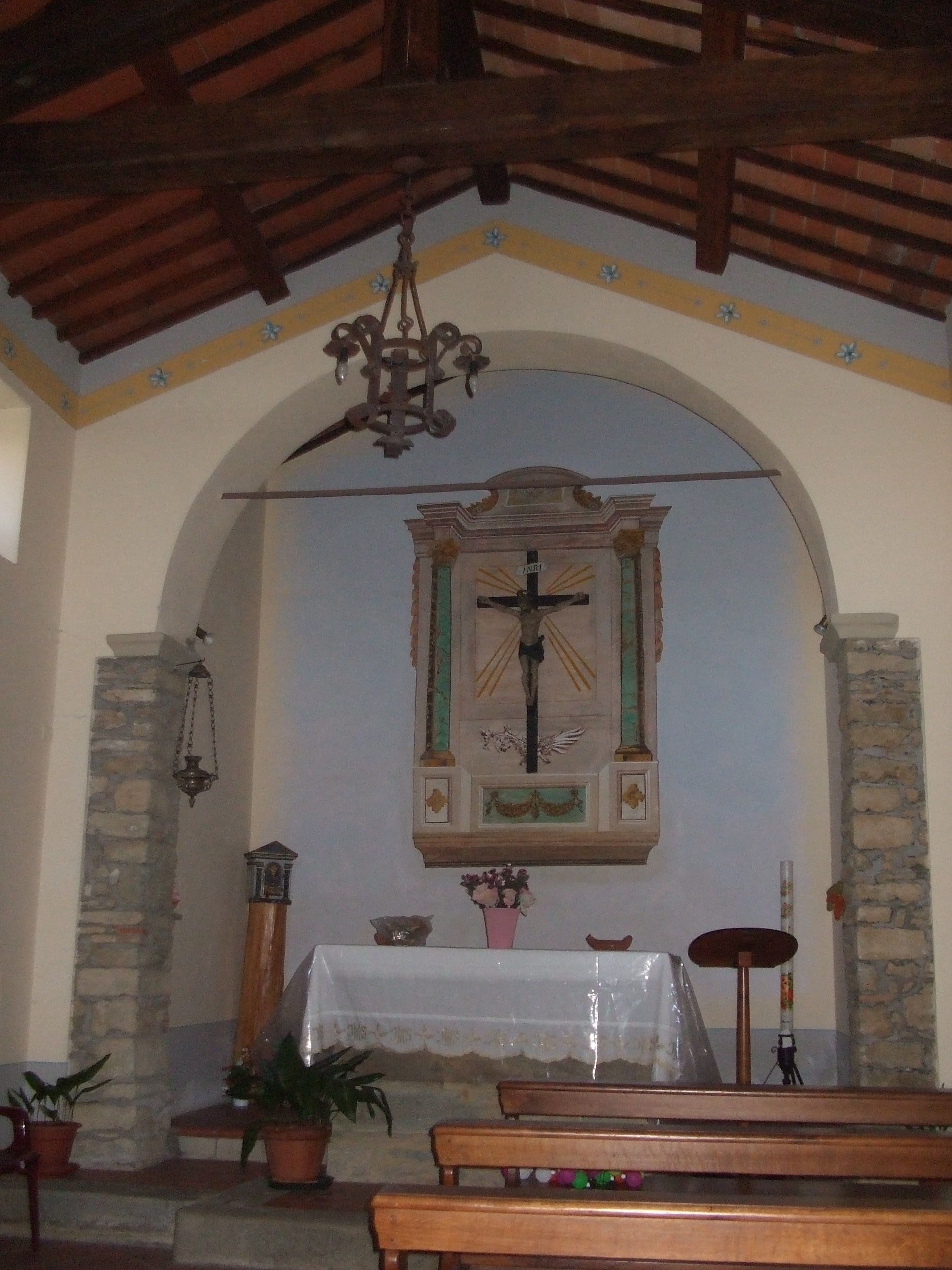 Montanina